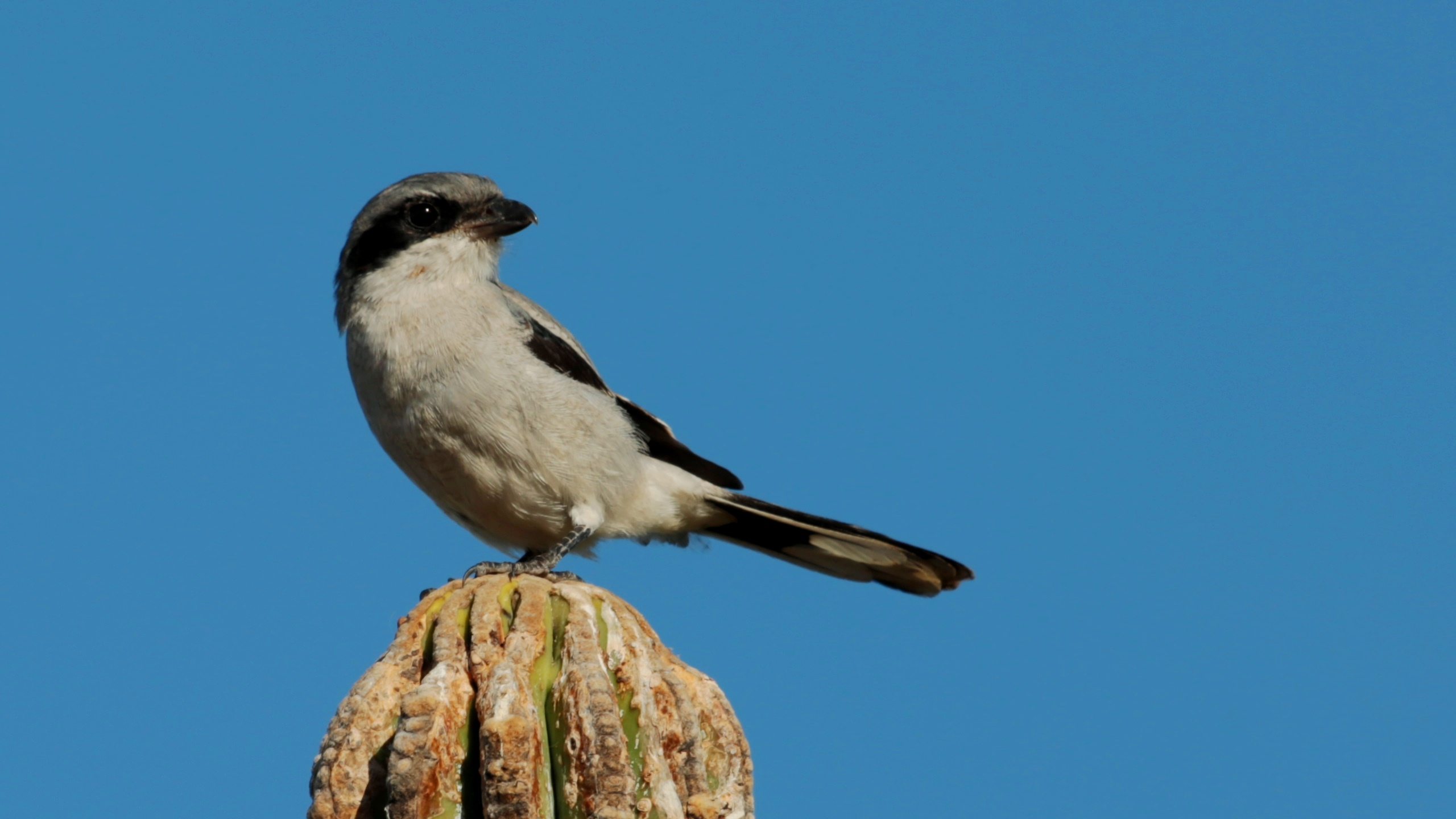 Alcaudón Verdugo